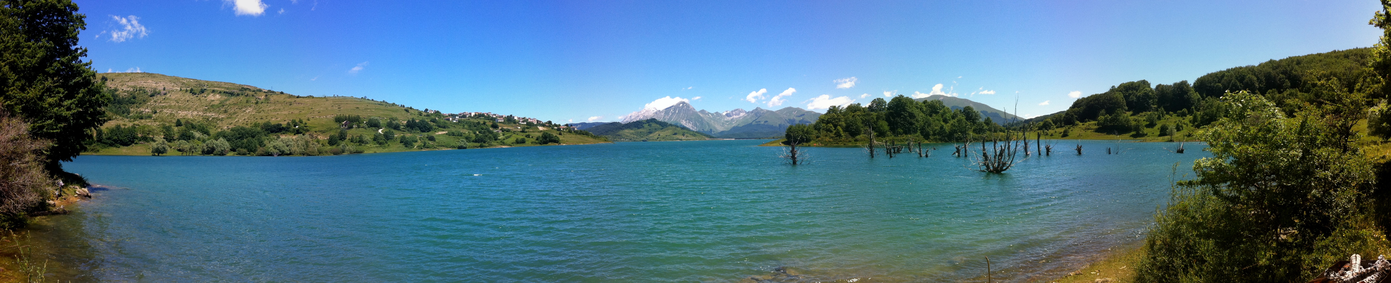 Foto panoramica del lago di Campotosto